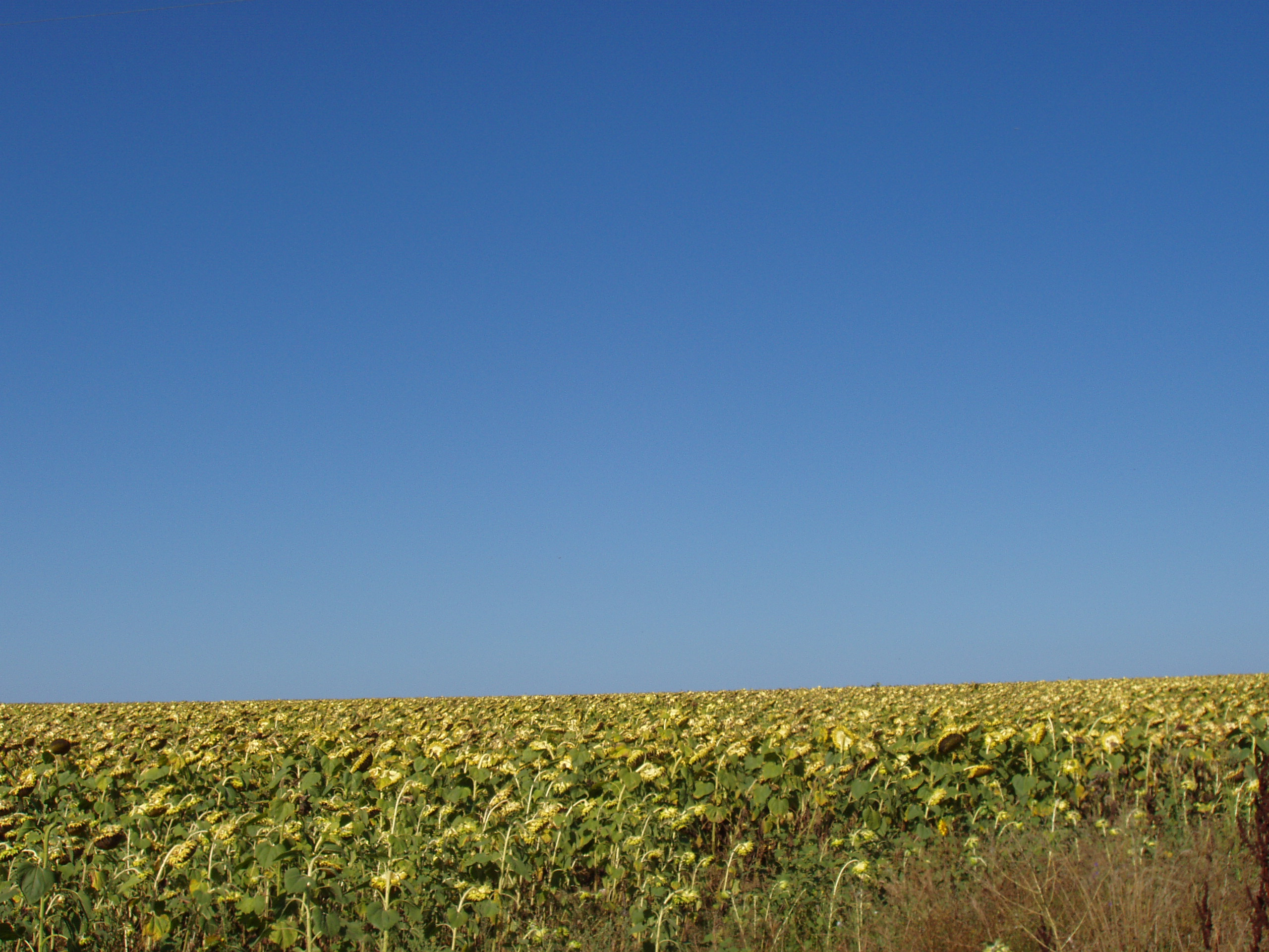 Изглед от Добруджа, Шабленско; © 2006 Свилен Енев